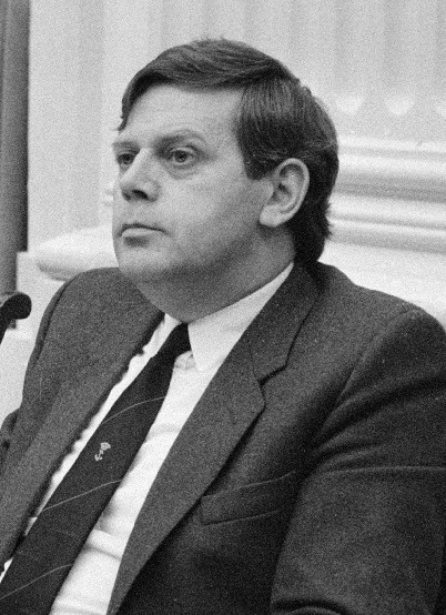 Frinking, CDA, Van Houwelingen , De Ruyter , Hoekzema (v.l.n.r.)